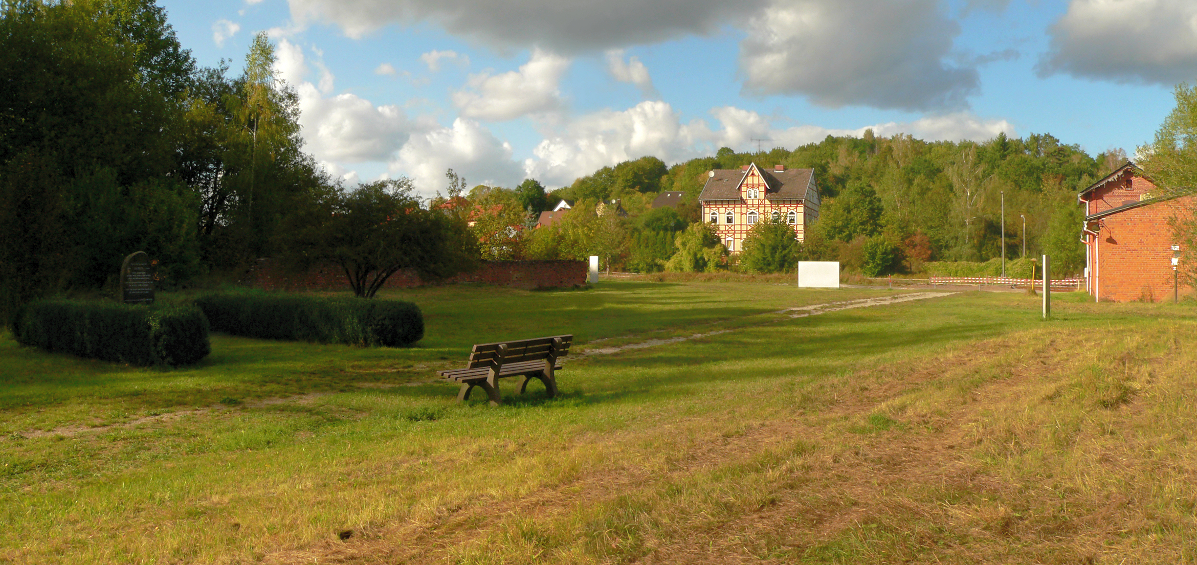 KZ-Außenlager Ellrich-Juliushütte, früherer Appellplatz mit Gedenkstein und früherer Eingang